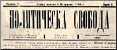 Вестник „Политическа свобода“.